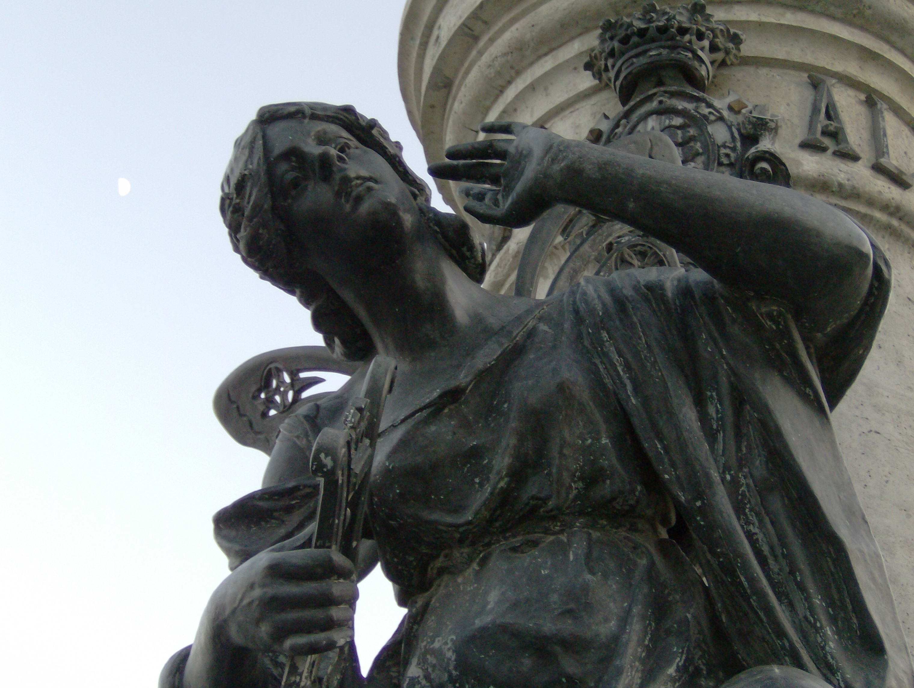 Monumento a Jose Zorrilla (Valladolid)